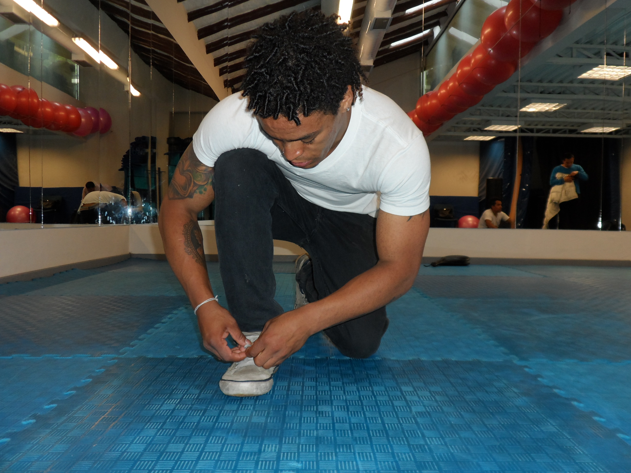 movimiento, acciones cotidianas que comprometen las reacciones motoras del cerebro